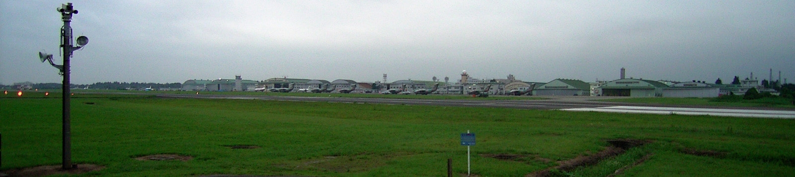 Runway Iruma Air base 2007, Japan. 9 Kawasaki C-1.